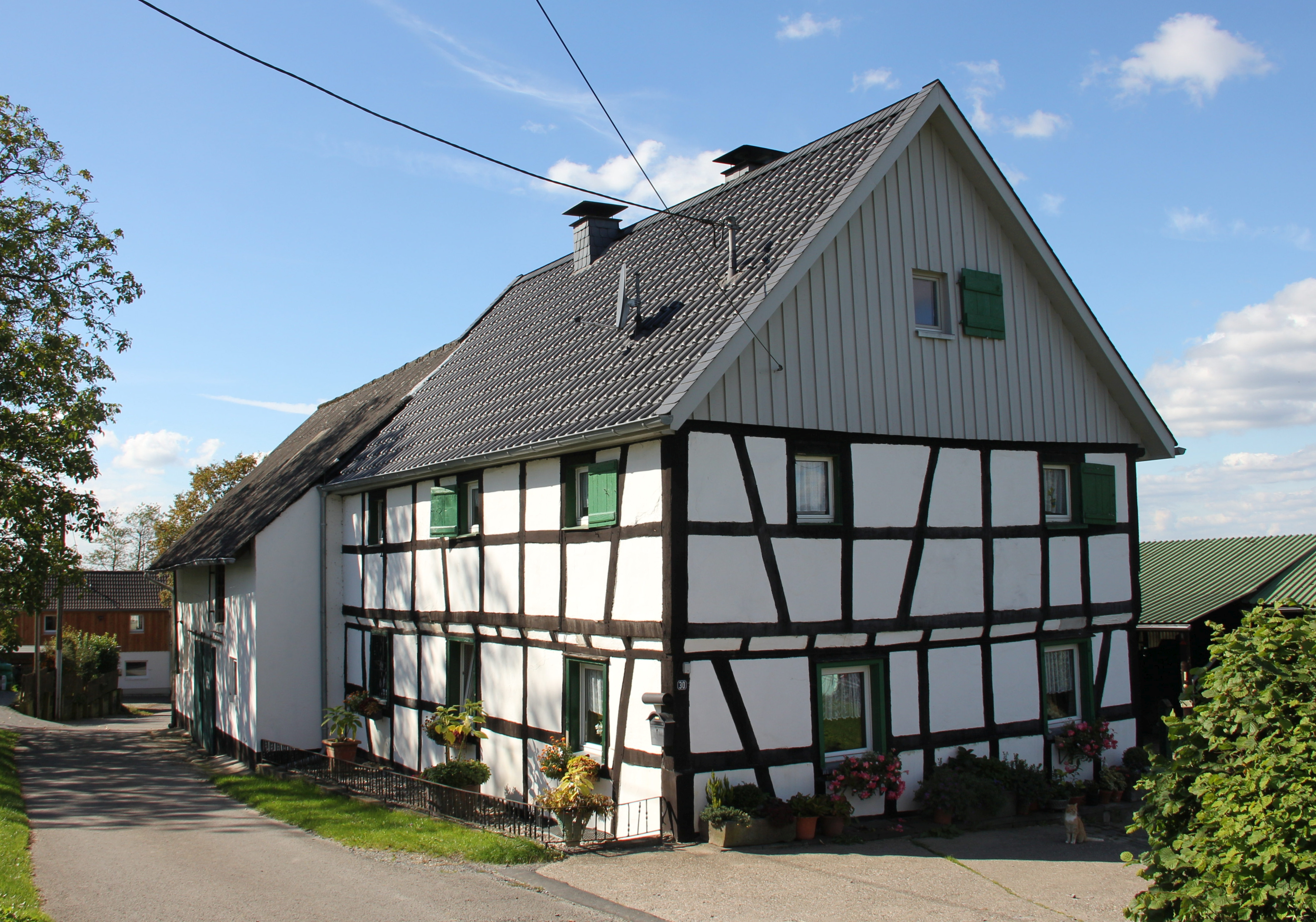 Fachwerkhaus Klefhauser Straße 30, Baudenkmal der Stadt Lohmar Nr 149, Das Fachwerkhaus stammt aus dem 17. Jahrhundert